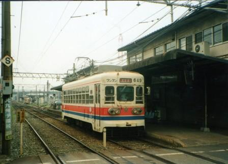 黒崎車庫前駅に停車中の600形電車